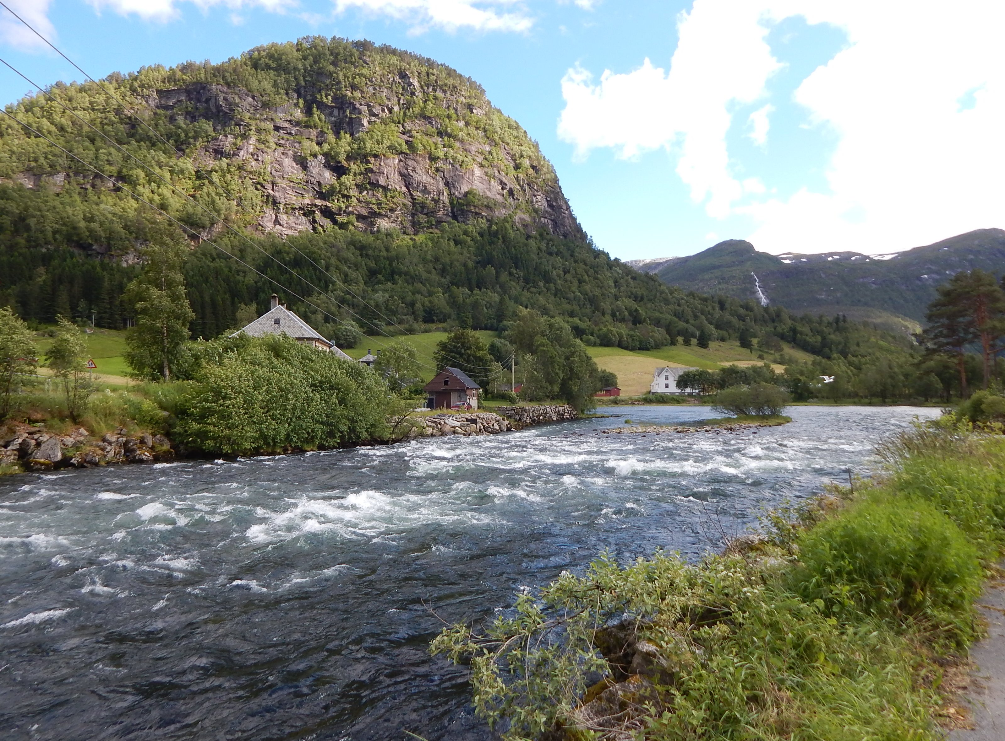 Gaula ved Viksdalen kirke